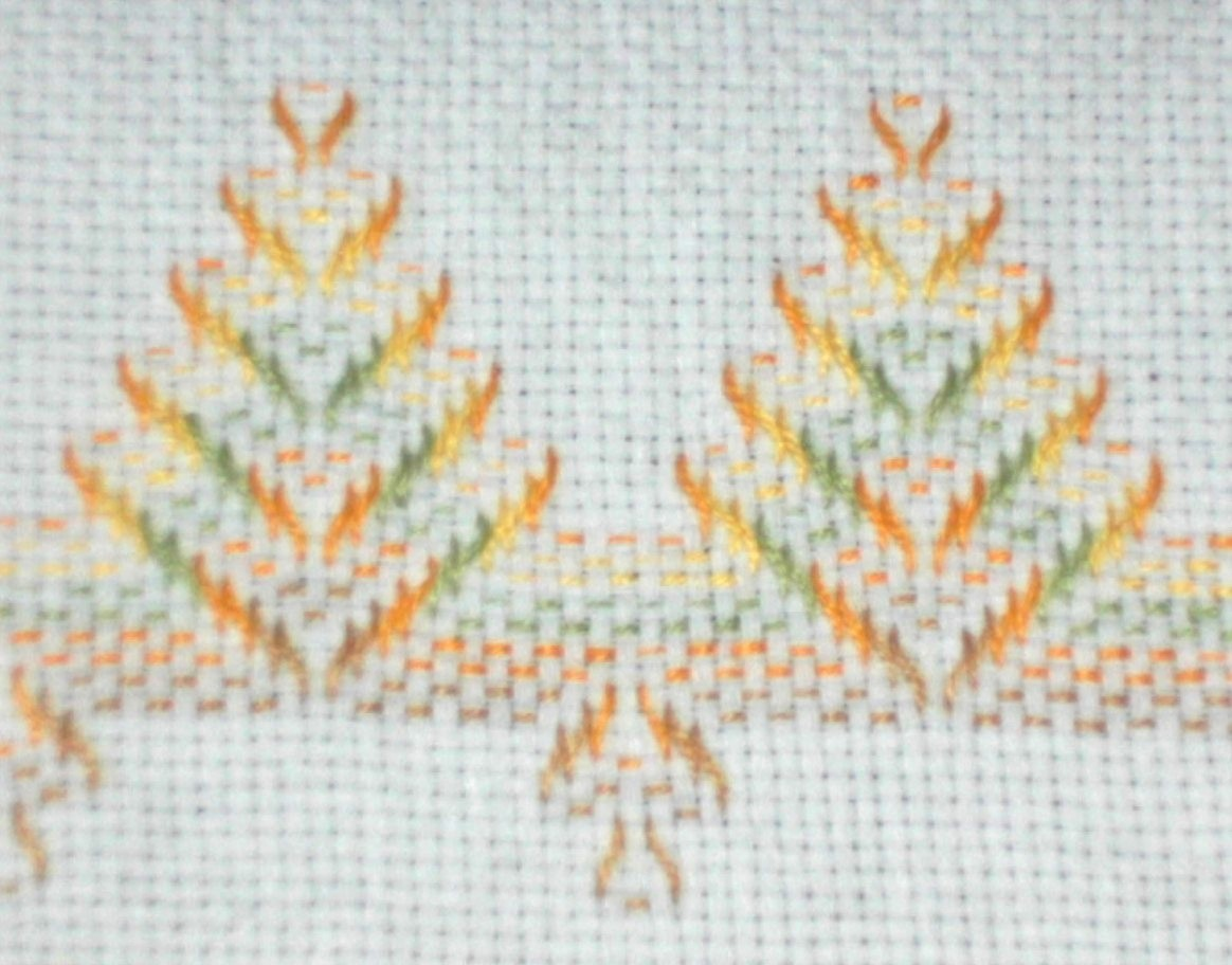 Ejemplo de Punto Yugoslavo